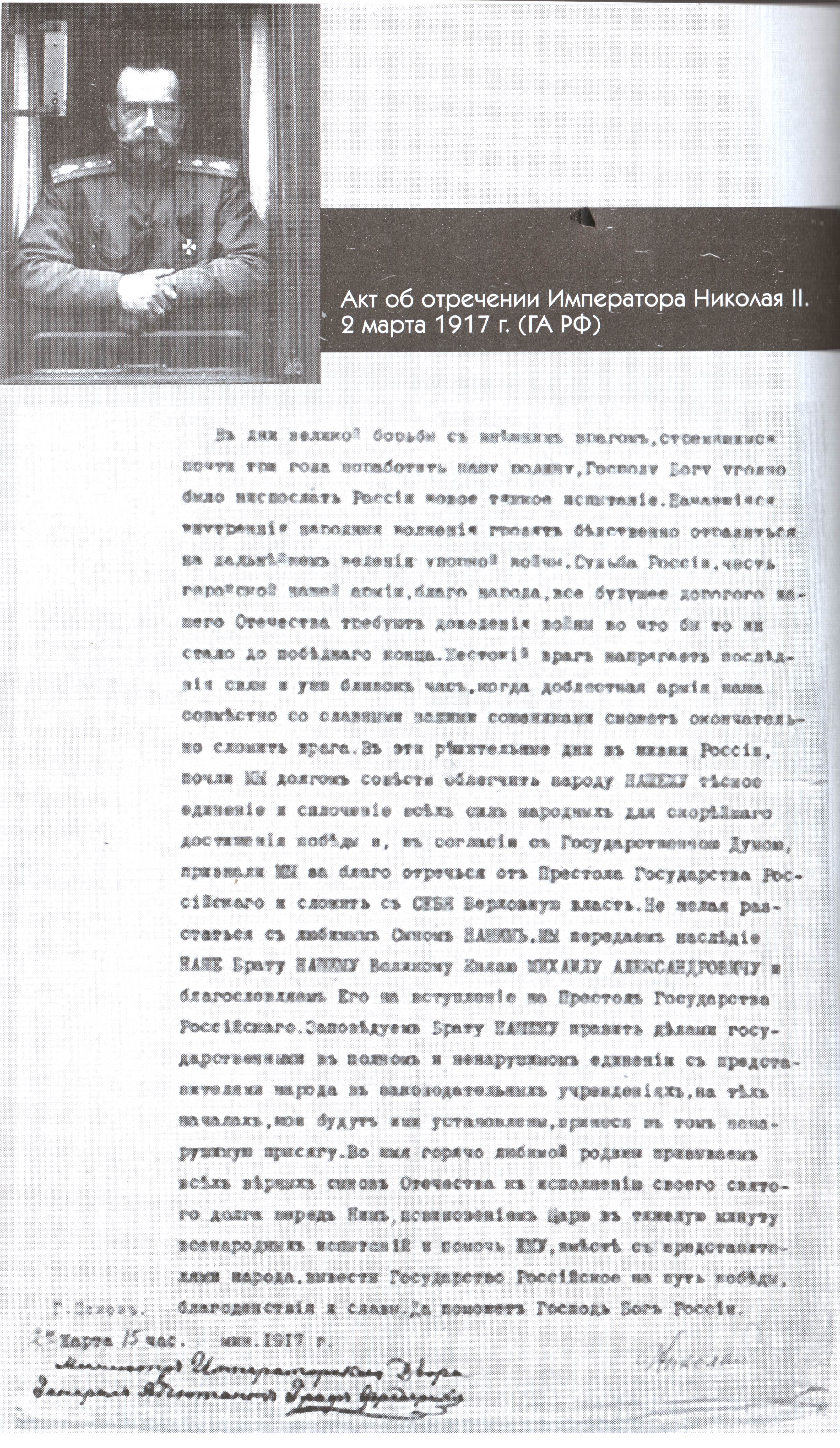 Акт об отречении Государя Императора Николая Александровича